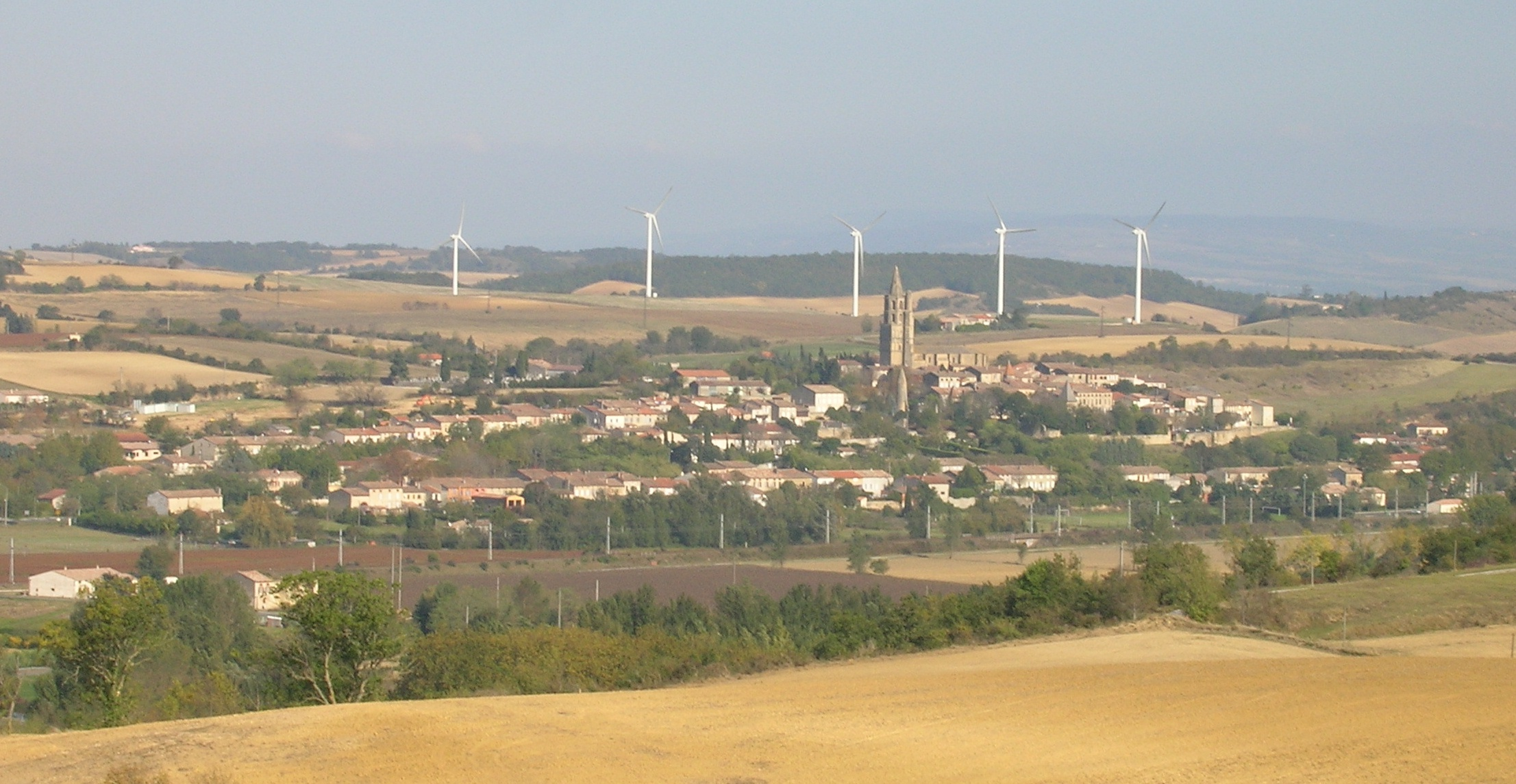 Avignonet-Lauragais (Haute-Garonne, France) - Le village vu depuis la D43.